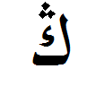 Der osmanisch-türkische Buchstabe Ñef in unverbundener Form.